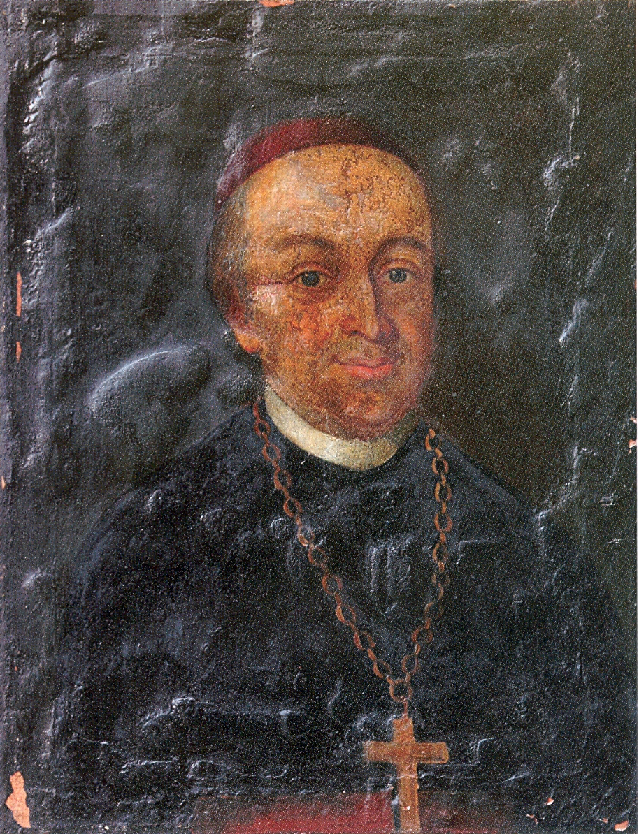 Batthyány Ignác erdélyi püspök.